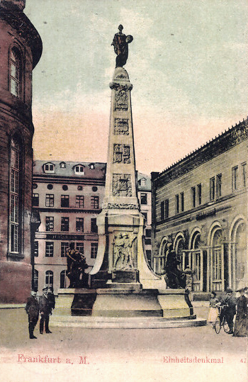 Einheitsdenkmal (1903) am Paulsplatz in Frankfurt, Ansichtskarte, gelaufen 1907